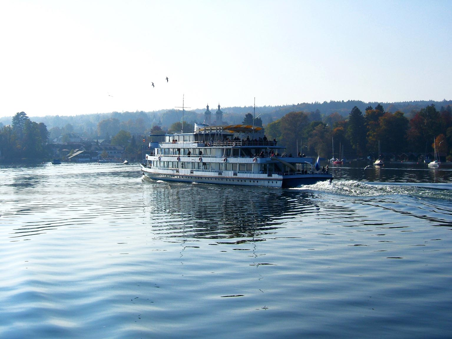 Starnberger See, das Motorschiff Seeshaupt (Baujahr 1955) mit Kurs auf Tutzing, Blick auf das Westufer, von der Personenfähre aus aufgenommen